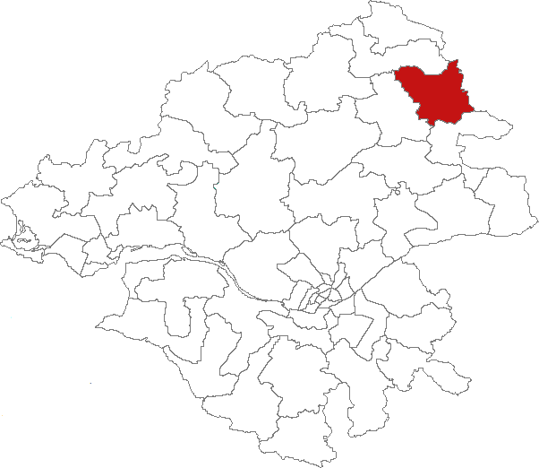 Carte de localisation du canton de Saint-Julien-de-Vouvantes (France, Loire-Atlantique)